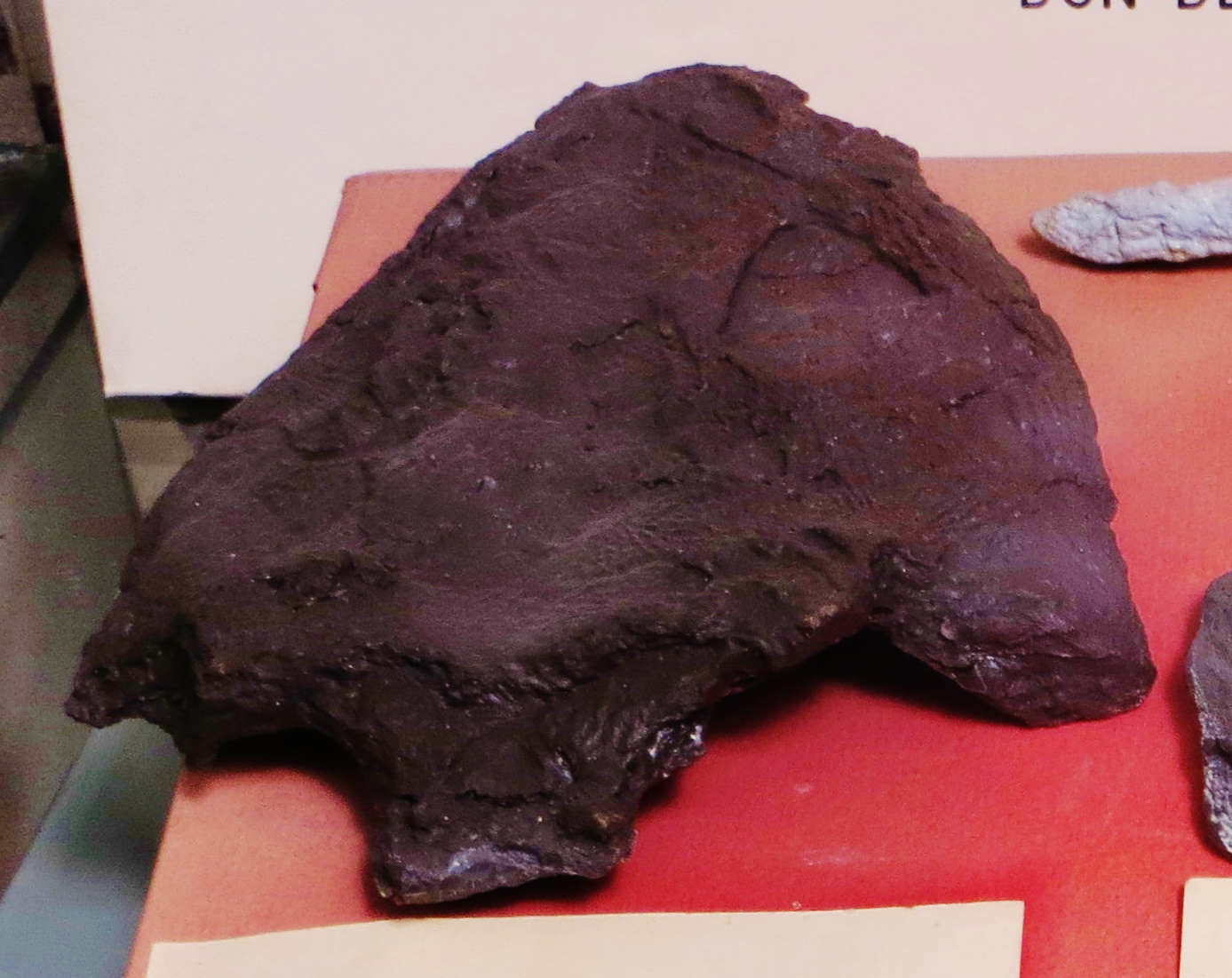 Fossil of Blinasaurus, an extinct amphibian- Took the photo at Museum Histoire Naturelle, Paris